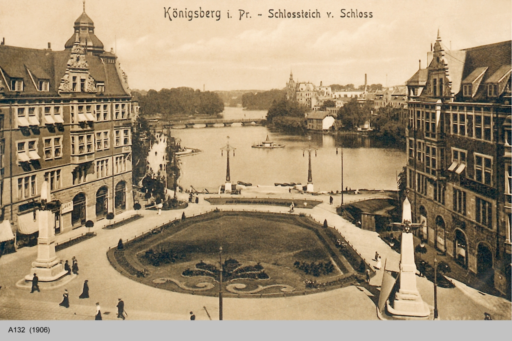 Auf dem Haberturm mit Blick auf Münzplatz und Schlossteich